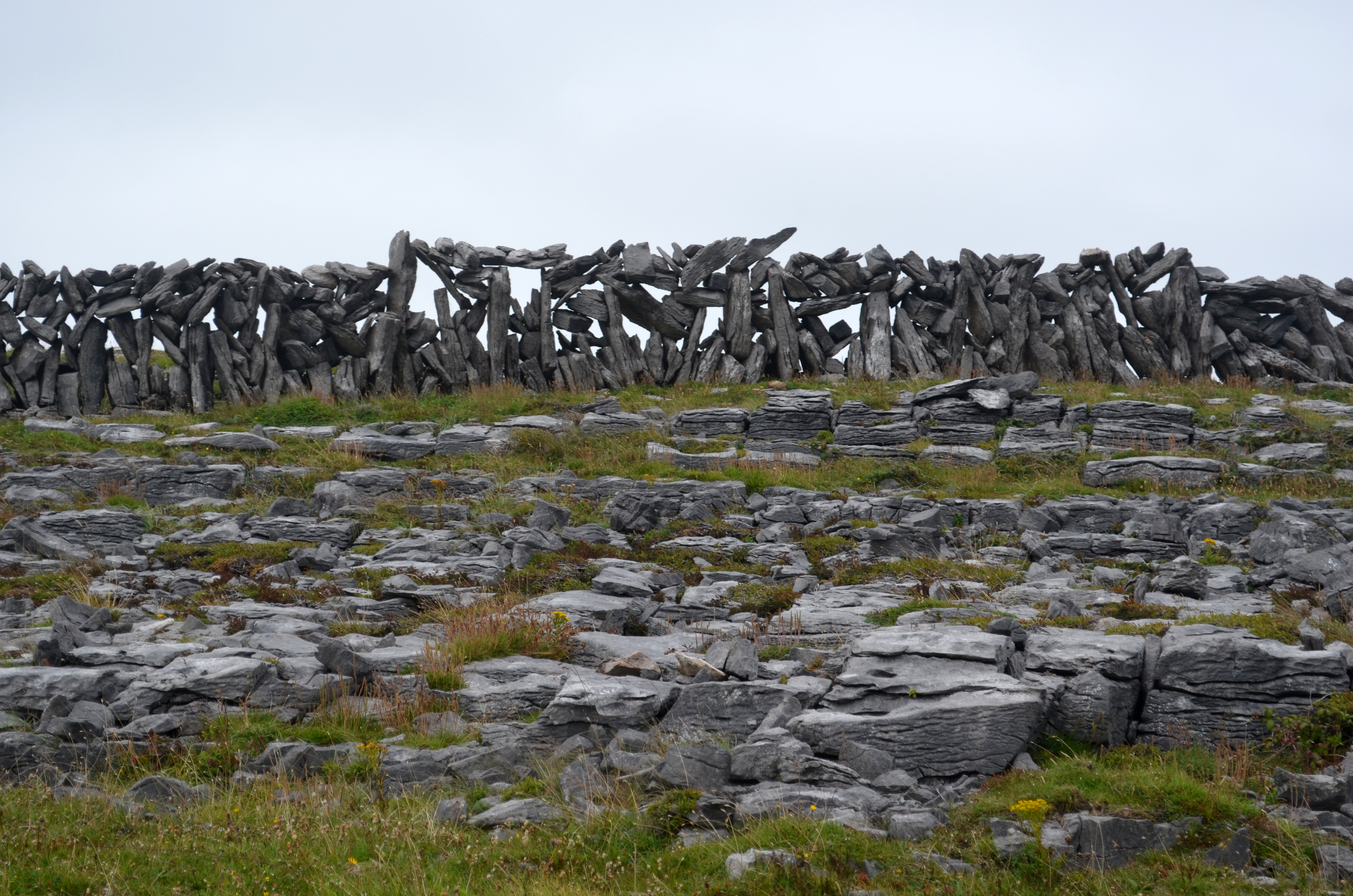 Muret de pierre à Inishmore.